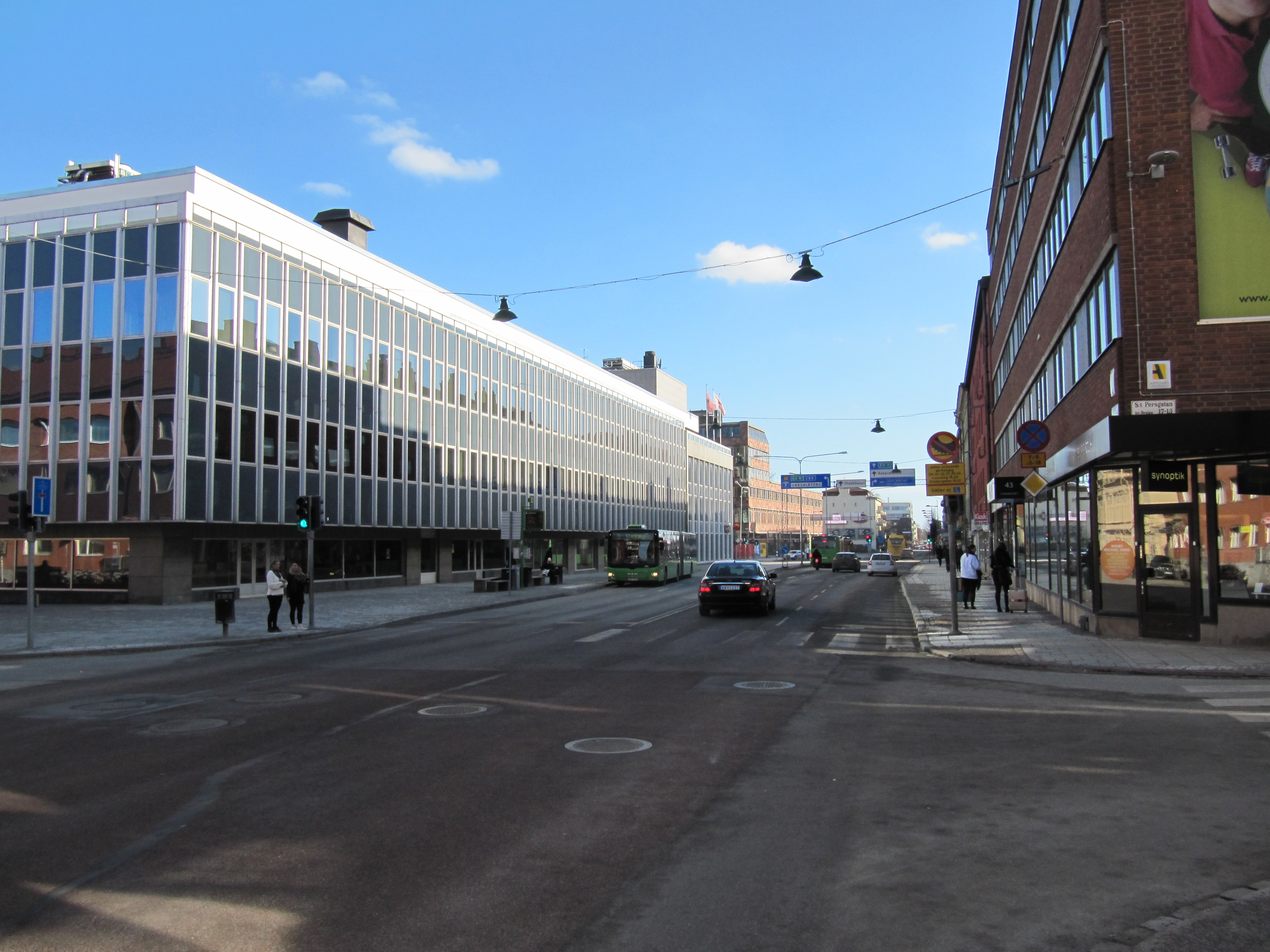 Kungsgatan i Uppsala vid korsningen mot Sankt Persgatan